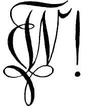 Zirkel der K.D.St.V. Bavaria Bonn